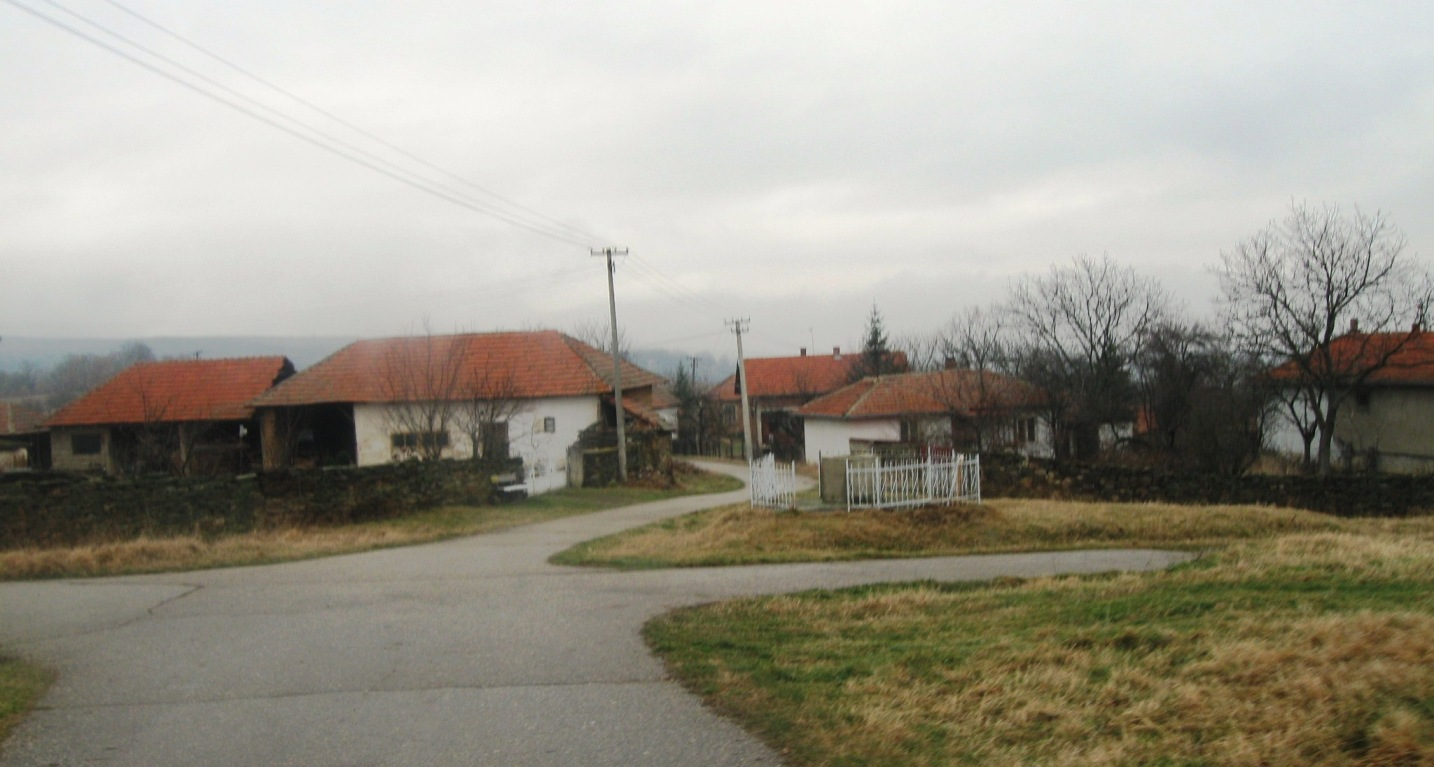 Vujanovo, Bojnik